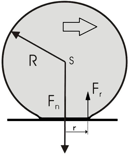 Rameno valivého odporu